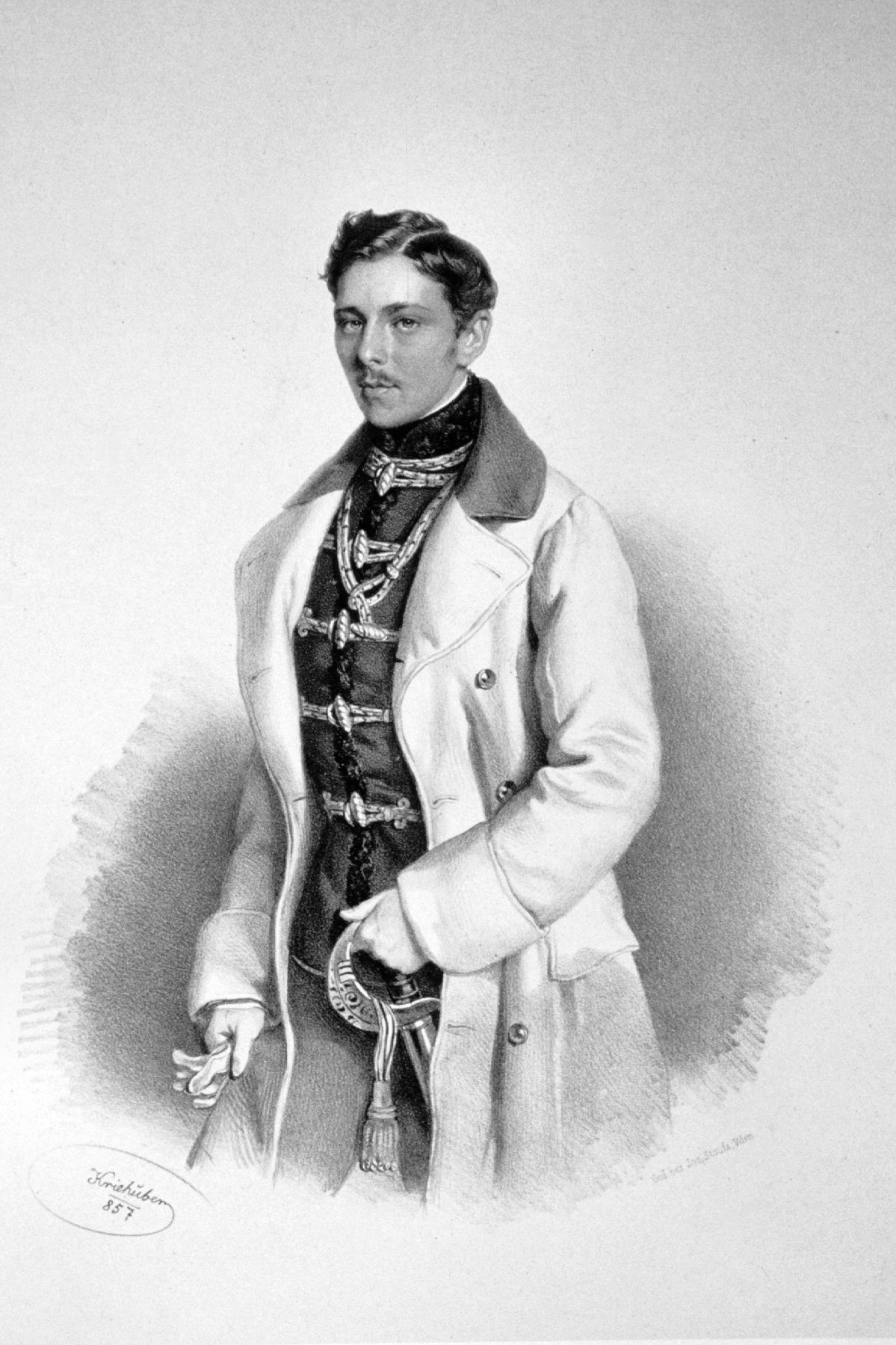 Viktor Seßler Freiherr von Herzinger (1836-1899),steirischer Eisenindustrieller. Lithographie von Josef Kriehuber, 1857 als Husarenoffizier.